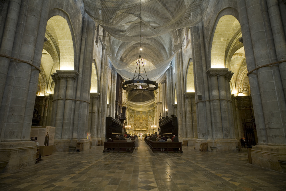 Cultural Heritage Spain RI-51-0000086